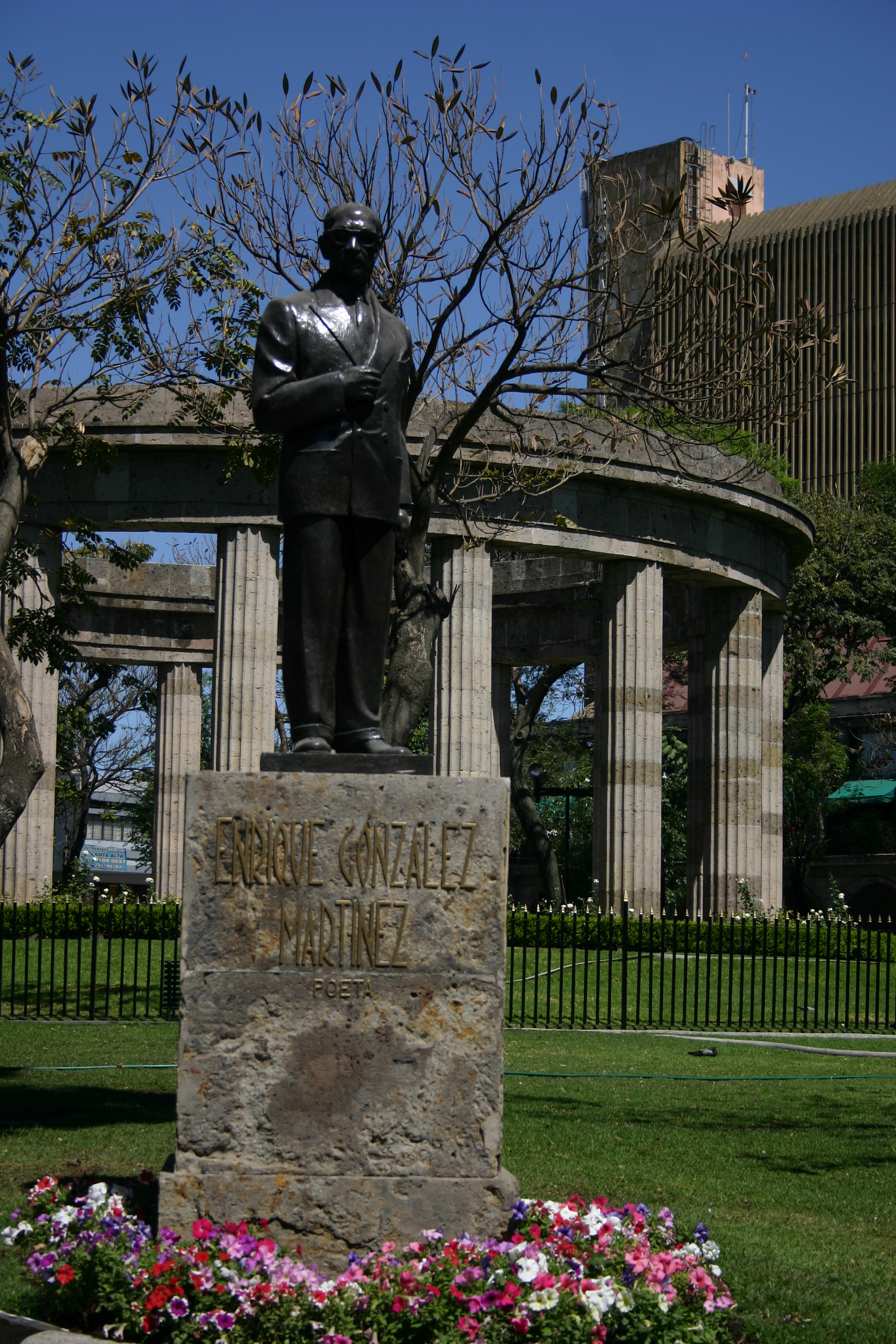 Enrique González Martínez en la Rotonda de los Jaliscienses Ilustres en Guadalajara, Jalisco, México.